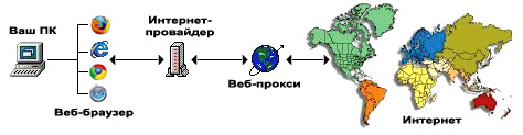 Взаимодействие ПК Интернет через веб-прокси